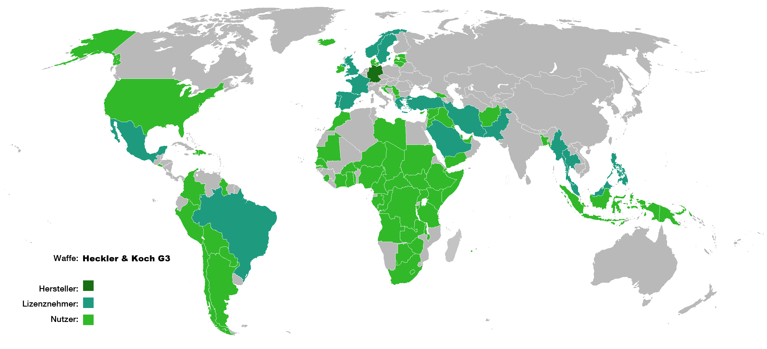 Verbreitung des Sturmgewehr HKG3